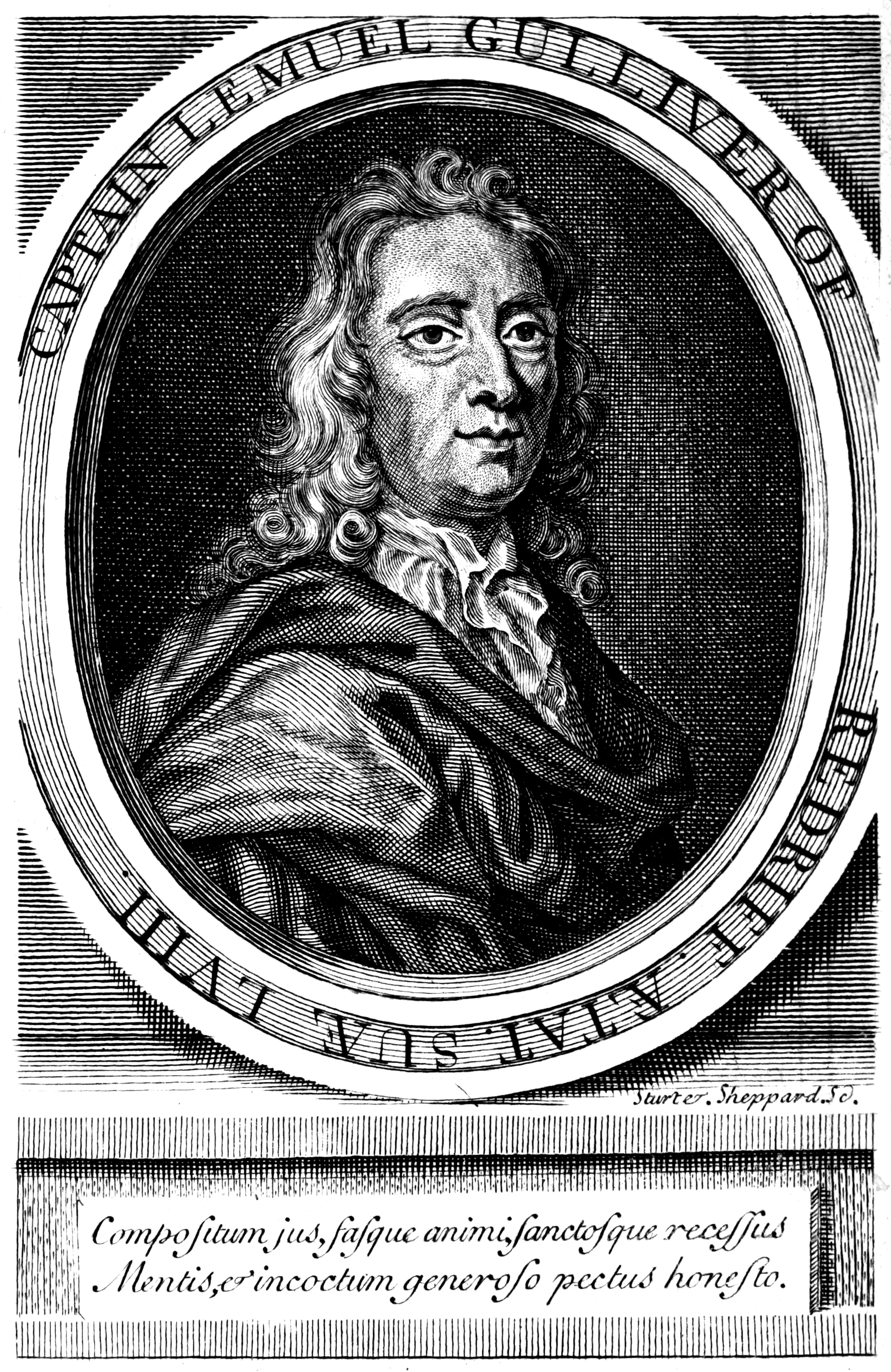 Captain Lemuel Gulliver - Bild aus Gullivers Reisen von 1726